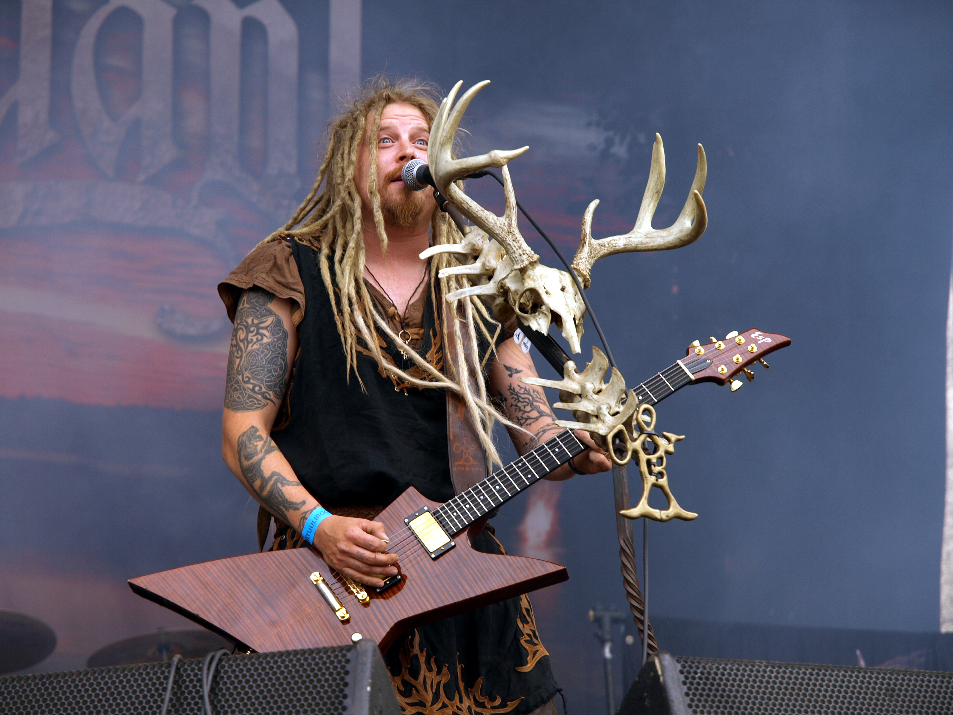 Korpiklaani live am Myötätuulirock 2011